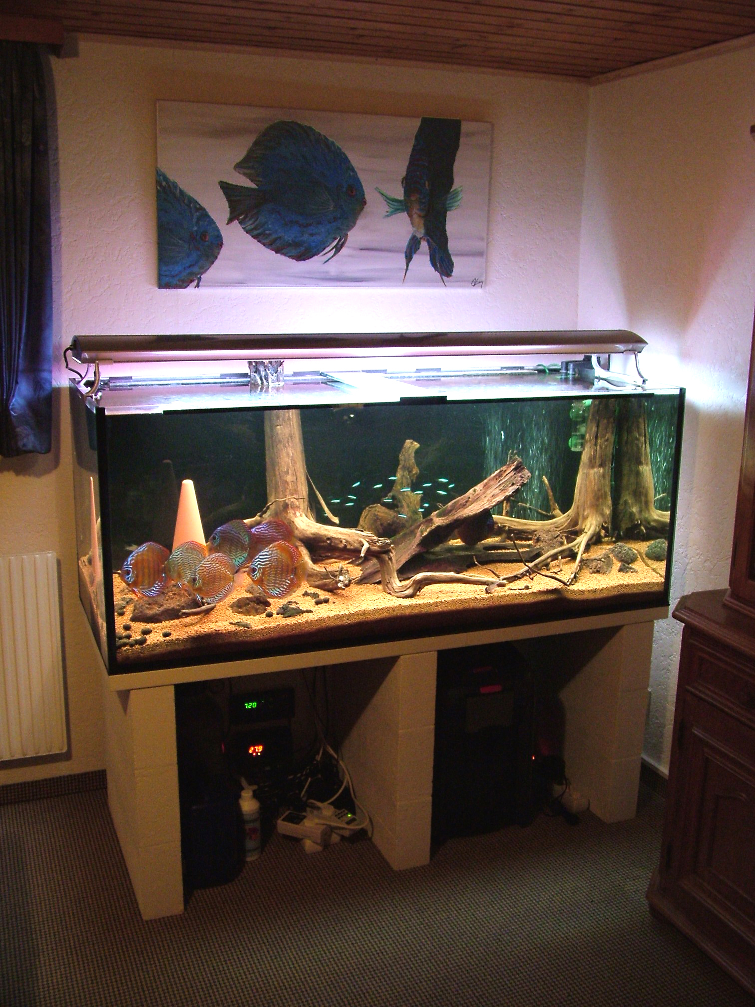 Typisches Diskus Aquarium